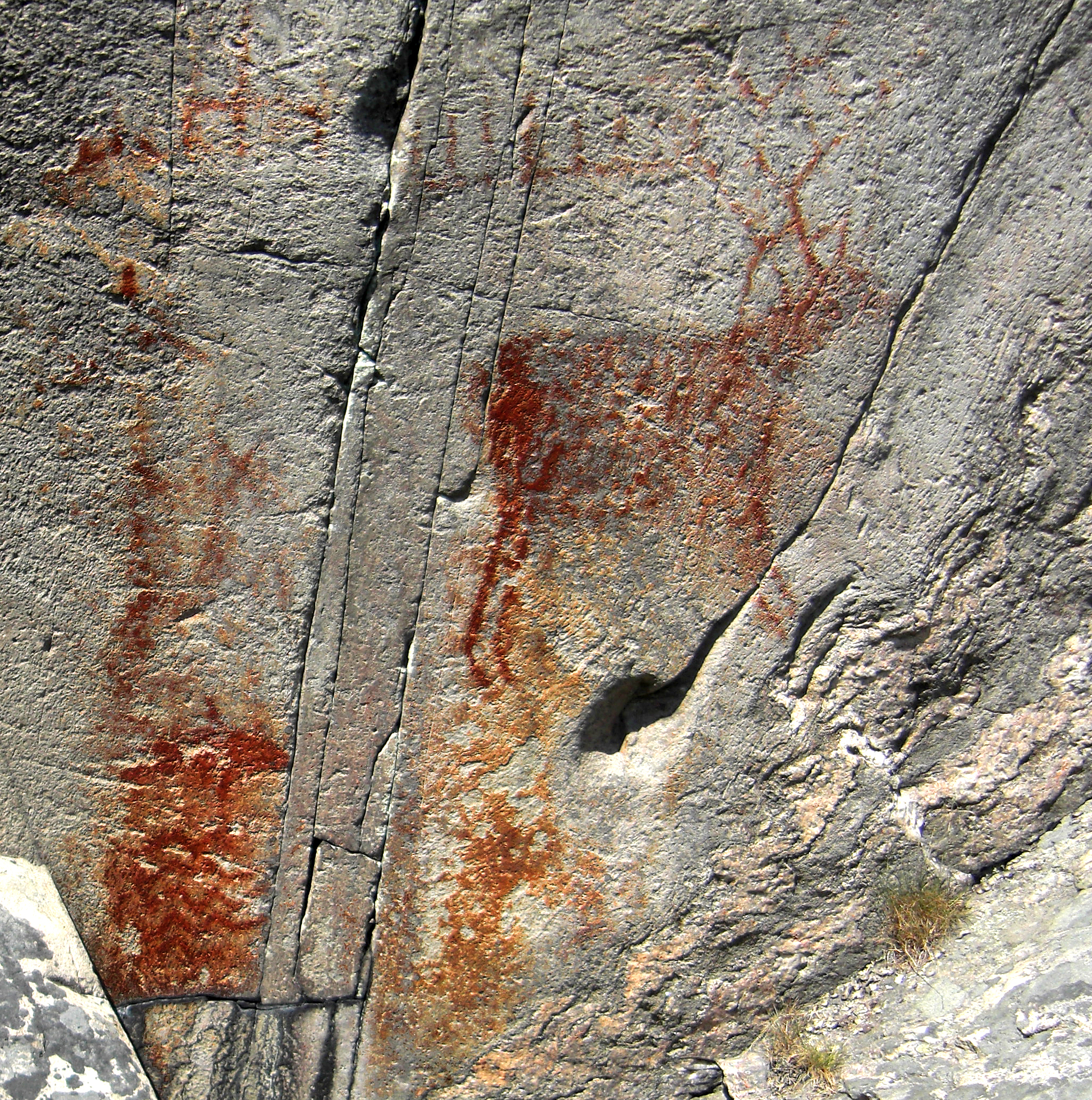 Hällmålningen i Tumlehed (RAÄ-nr Torslanda 216:1) i Torslanda socken, Västra Hisings härad, Göteborgs kommun, Bohuslän, Västra Götalands län, Sverige. Hällmålningen verkar förställa en hjort, delfiner och fiskenät. Rödockran är digitalt förstärkt i Photoshop.